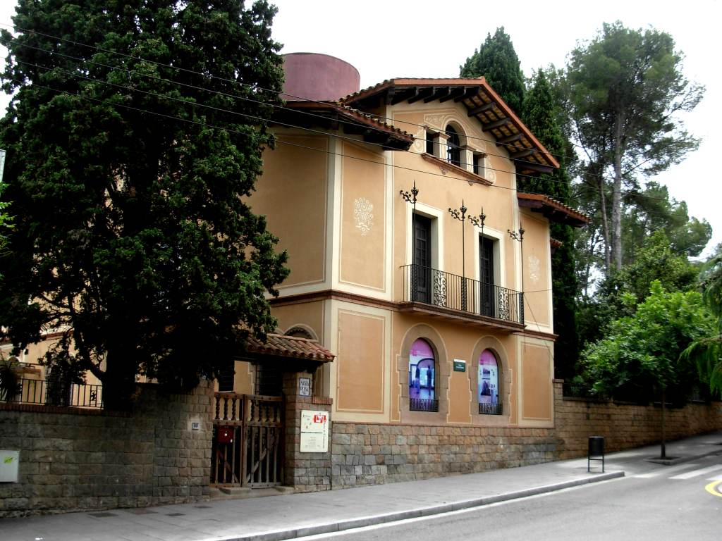 Can Ortadó Museum (Cerdanyola del Vallès/Barcelona province/Katalonien/Spanien)